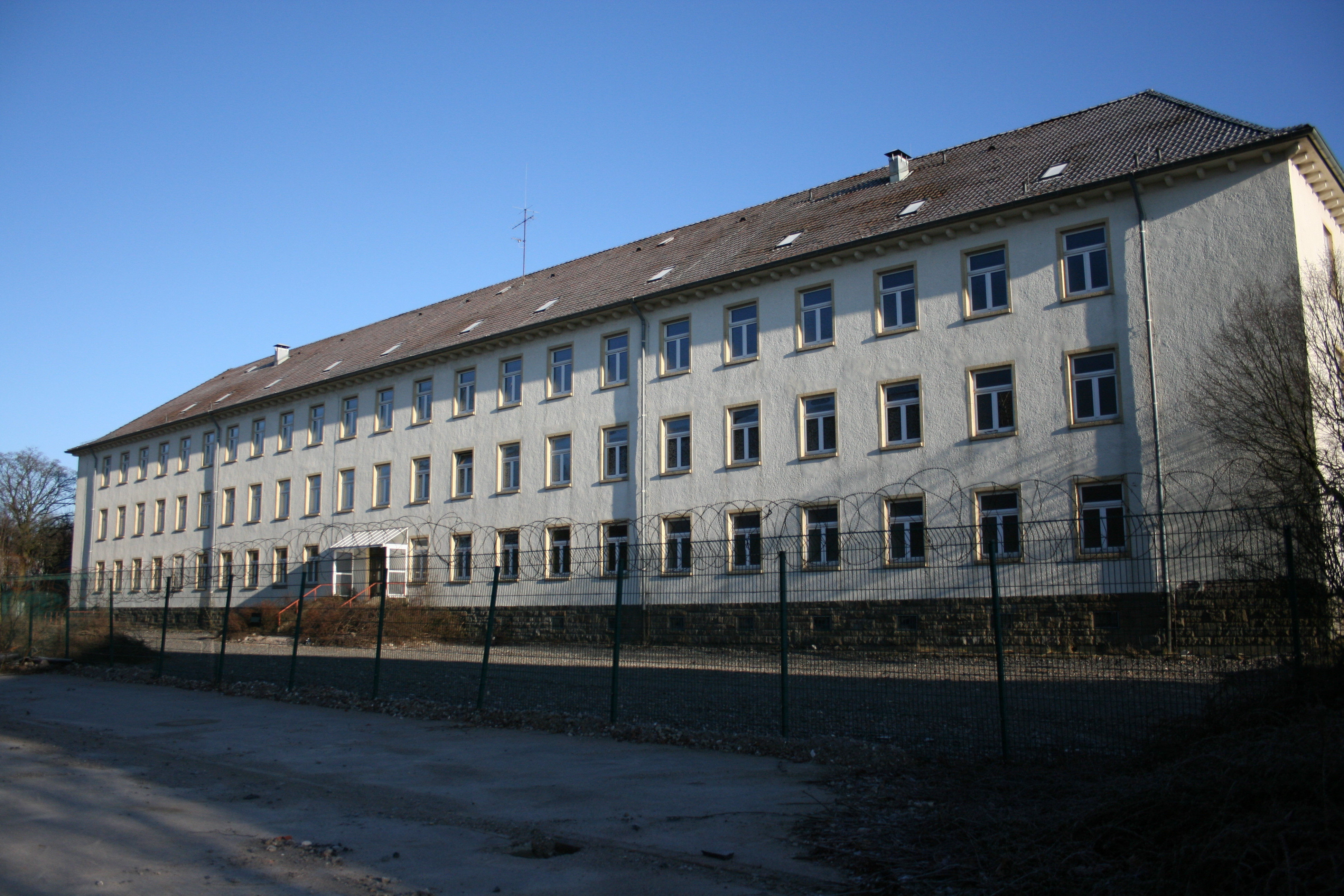 Geschlossene Colmar-Kaserne in Wuppertal: Dieses Gebäude bleibt erhalten und wird für eine neue Nutzung umgebaut.